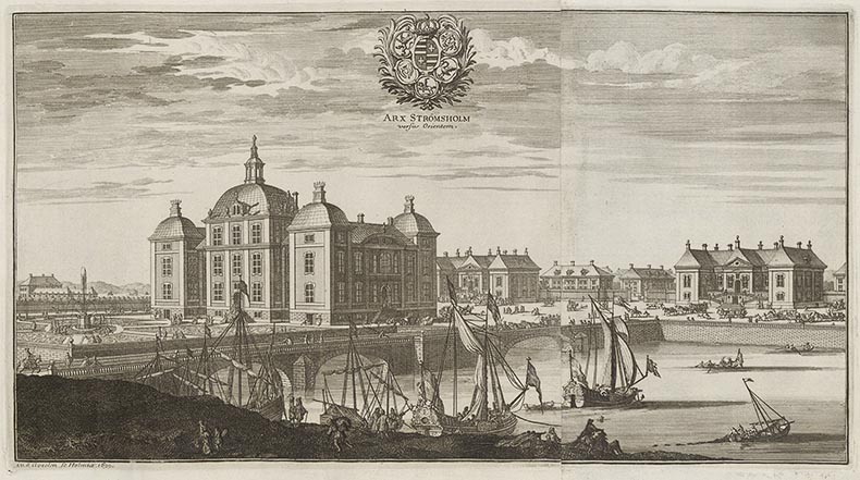 Strömsholms slott från öster i Suecia antiqua et hodierna.